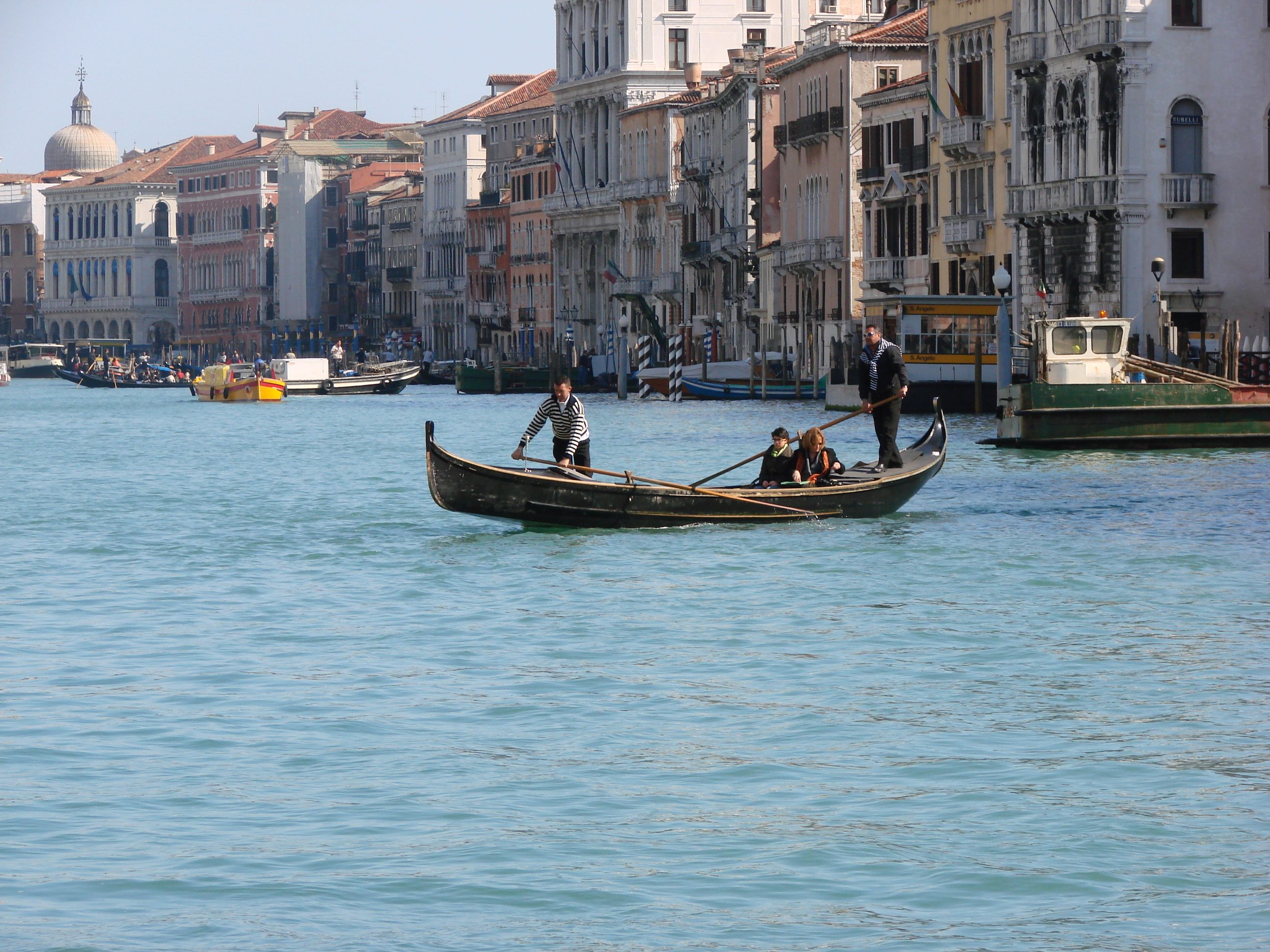 Traghetto a San Tomà, a Venezia.